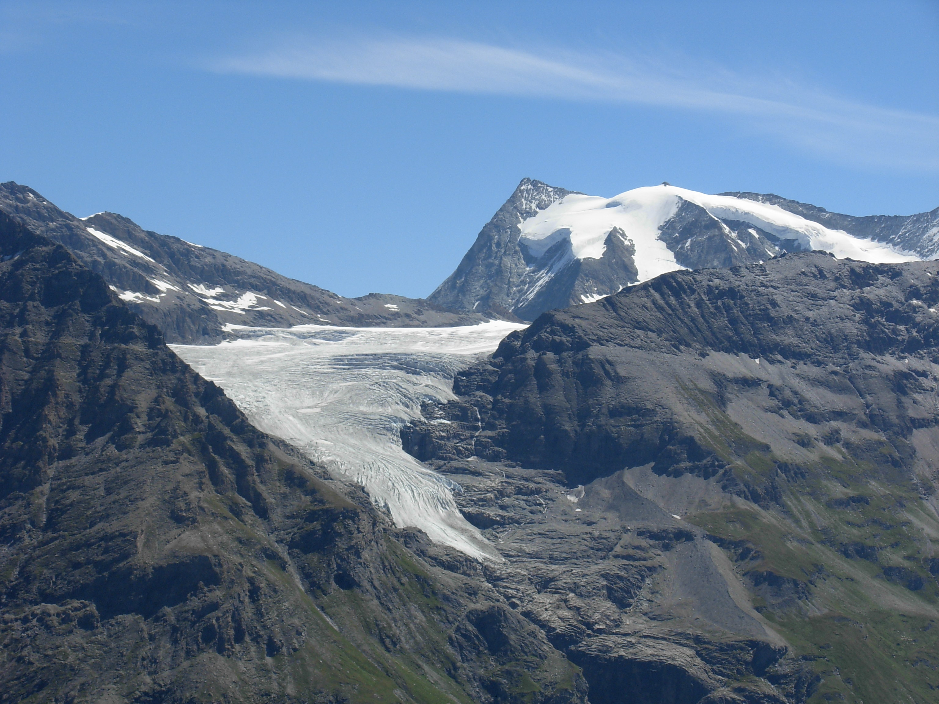 Le Glacier du Giétro et le Mont Blanc de Cheilon, vus depuis la montée vers le Col des Otanes. Août 2007.